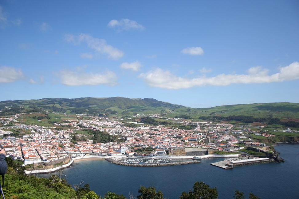 Cidade de Angra do Heroismo e Baía de Angra do Heroísmo, ilha Terceira, Açores, Portugal.